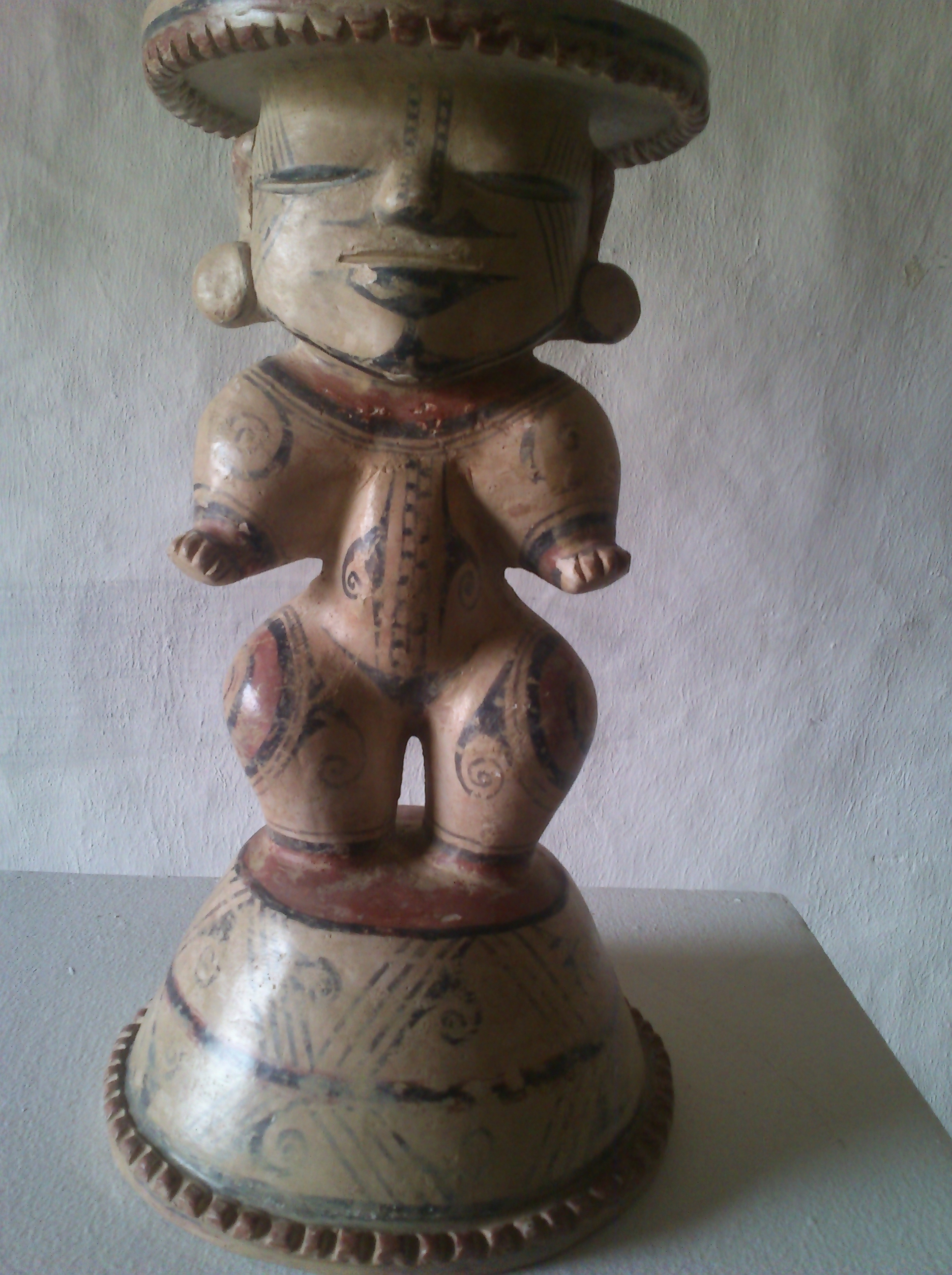 Interior y exposiciones del Museo arqueológico La Merced Cali